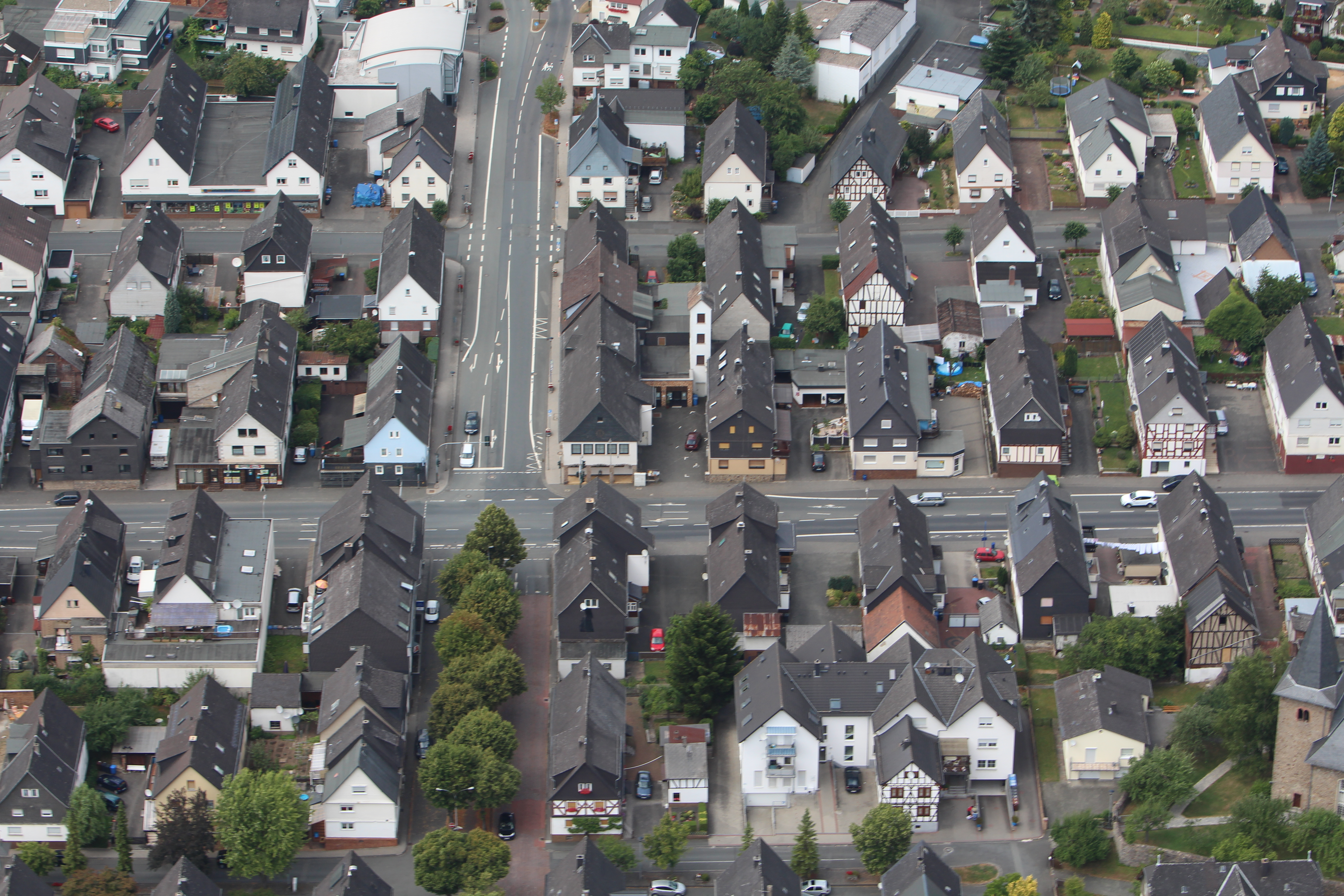 Die Ortsmitte des Dillenburger Stadtteils Frohnhausen